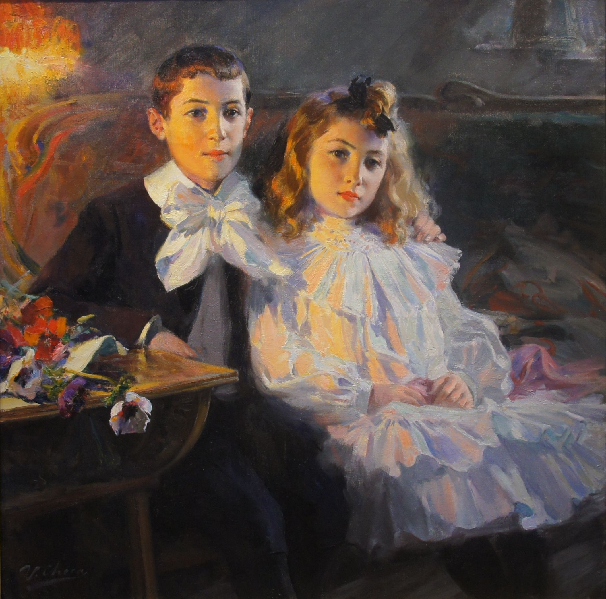 Carmen y Felipe, hijos del pintor, óleo sobre lienzo, 100,5 x 100,5 cm. 1904, firmado ángulo inferior izquierdo. Salón oficial de París 1904. "Gracias a un doble efecto de luz, violento pero exacto, que produce una lámpara en un lado del cuadro, poco indicada como detalle, pero cuyos rayos son de una extrema intensidad, las dos figuras de los dos nños, la niña rubia de delicada piel, con vestido blanco, sentada sobre un canapé al lado de su hermano, vestido de negro, están magnificamente iluminados. Hay aquí una gama de complementarios colores muy estudiada e interesante por los valores que he dado a este grupo, de factura tan simple, toma una fuerza extraordinaria, hecha de gracia y emoción". (Georges Bal "Au Jour le jours dans les ateliers".)